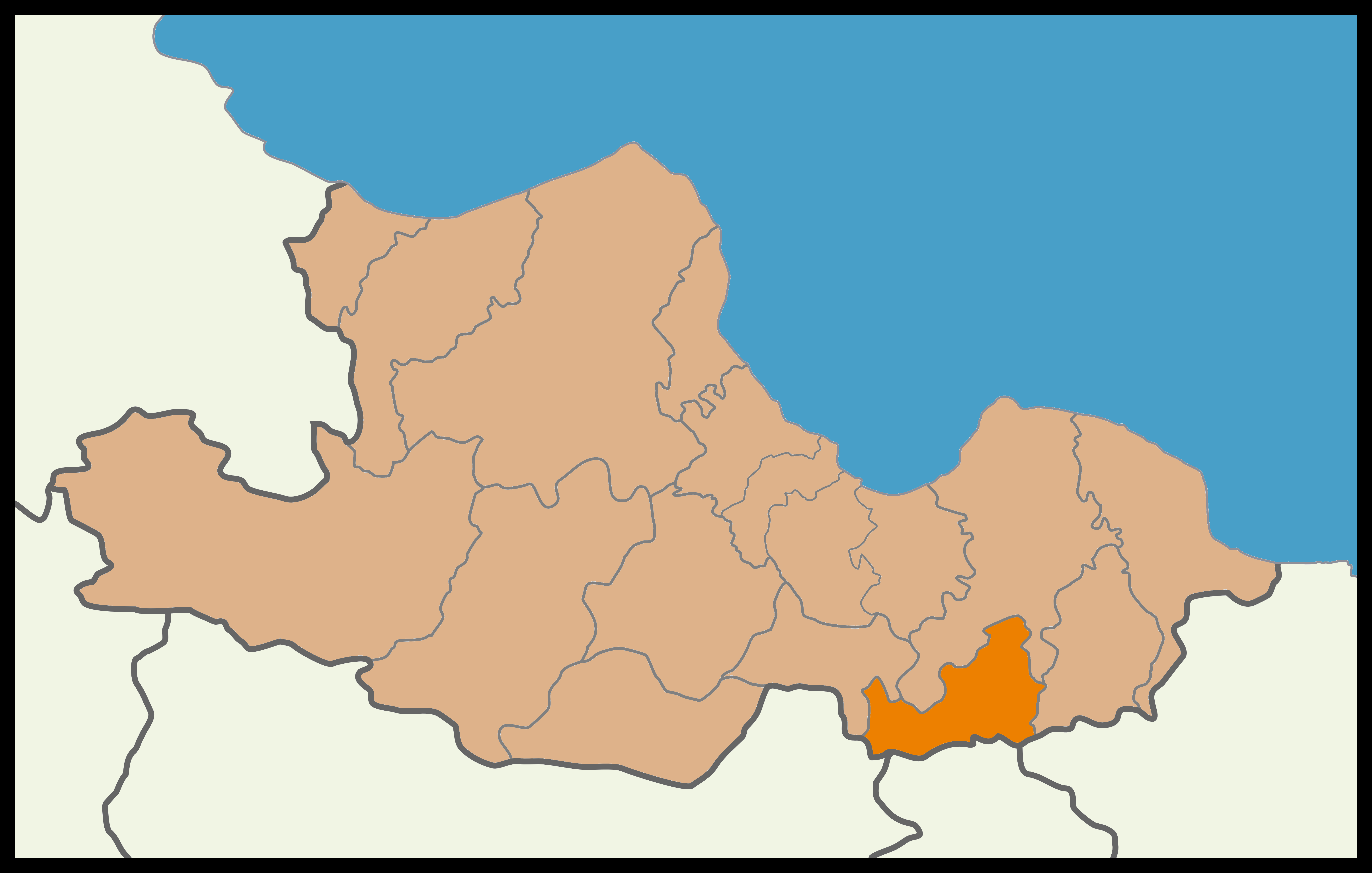 Samsun'un Ayvacık ilçesinin 2014 Türkiye yerel seçimleri haritası.